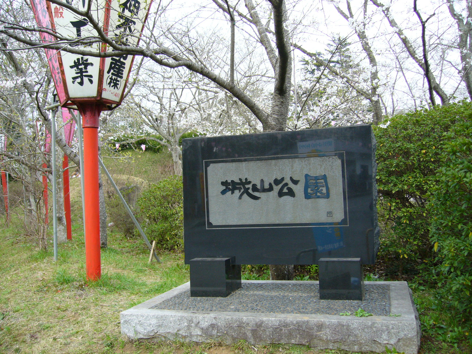 joyama park entrance,katori-city,japan.